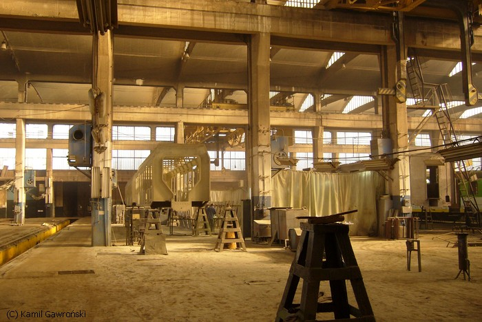 Wnętrze hali ZNTK Mińsk Mazowiecki. Po lewej stronie widoczne szkielety członu środkowego i członu rozrządczego nieukończonego prototypu elektrycznego zespołu trakcyjnego typu 18WE.